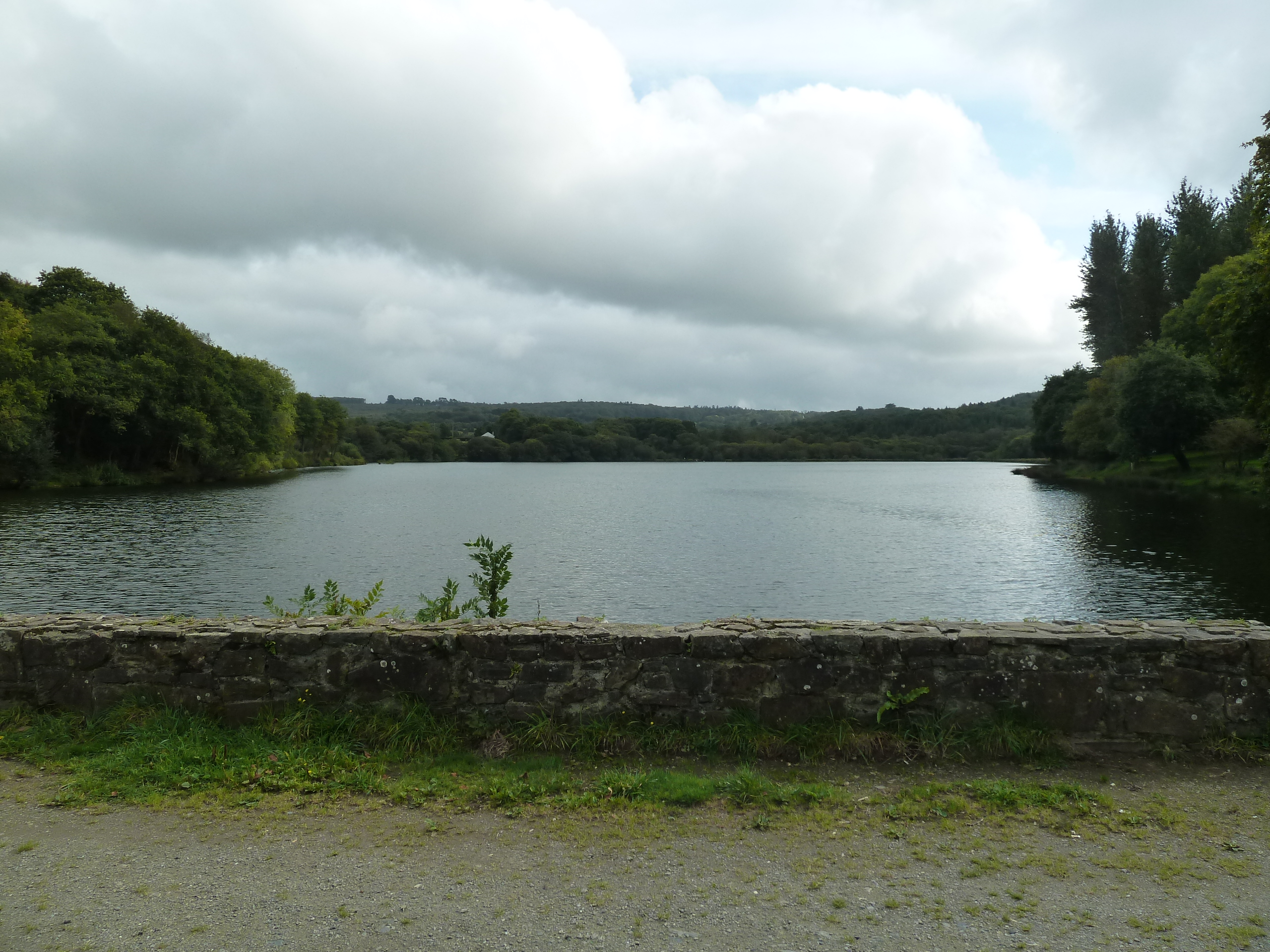 Etang du Roual à Dirinon